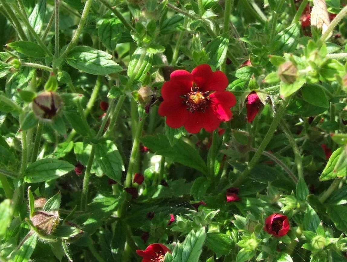 Potentilla atrosanquinea (pl. pięciornik krwisty)